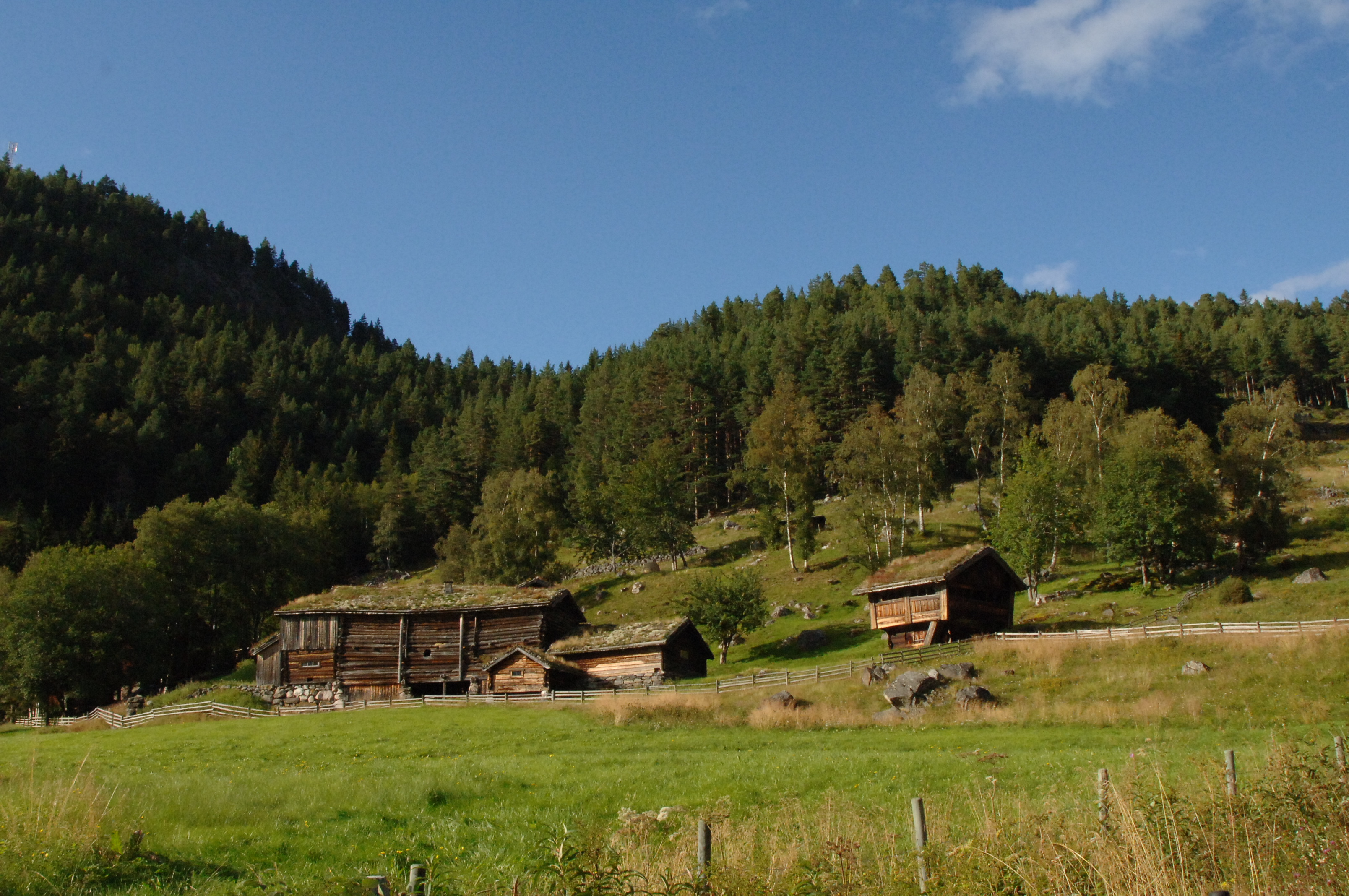 Garden slik han ligg på Rygnestad i Valle kommune. Vond-Åsmundloptet til høgre.